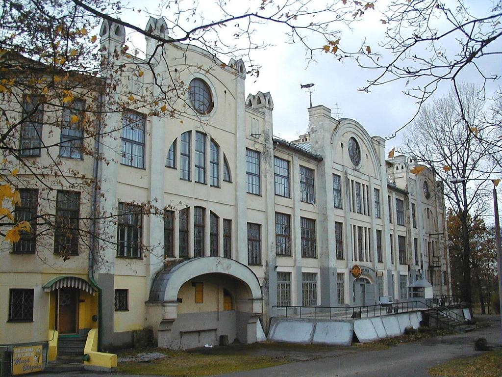 Rīga, Kultūras nams Ziemeļblāzma 2002-11-03